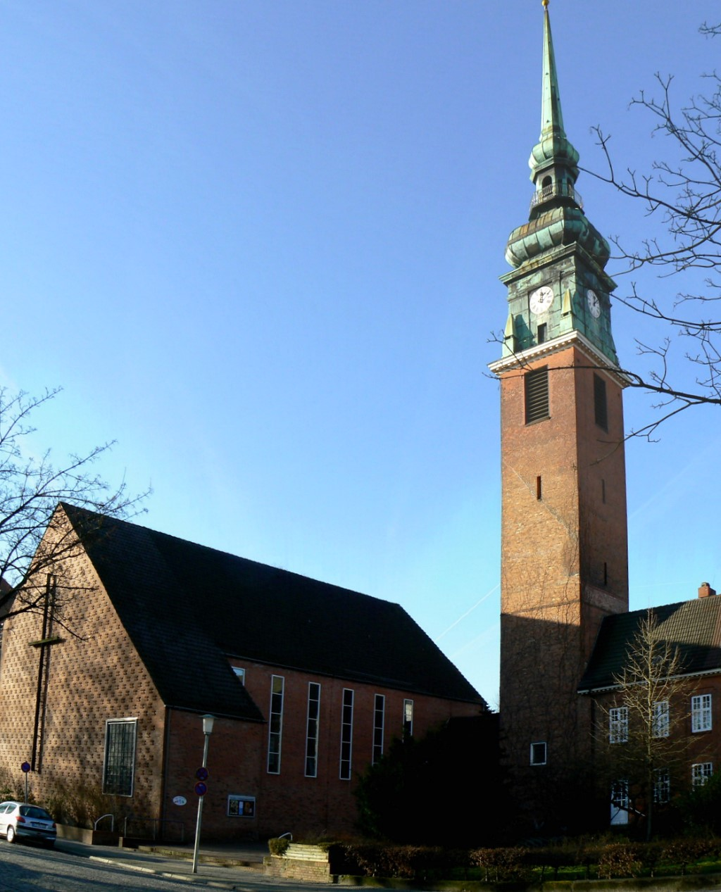 Lutherkirche in Kiel am Schrevenpark. (Montage aus zwei Fotos)